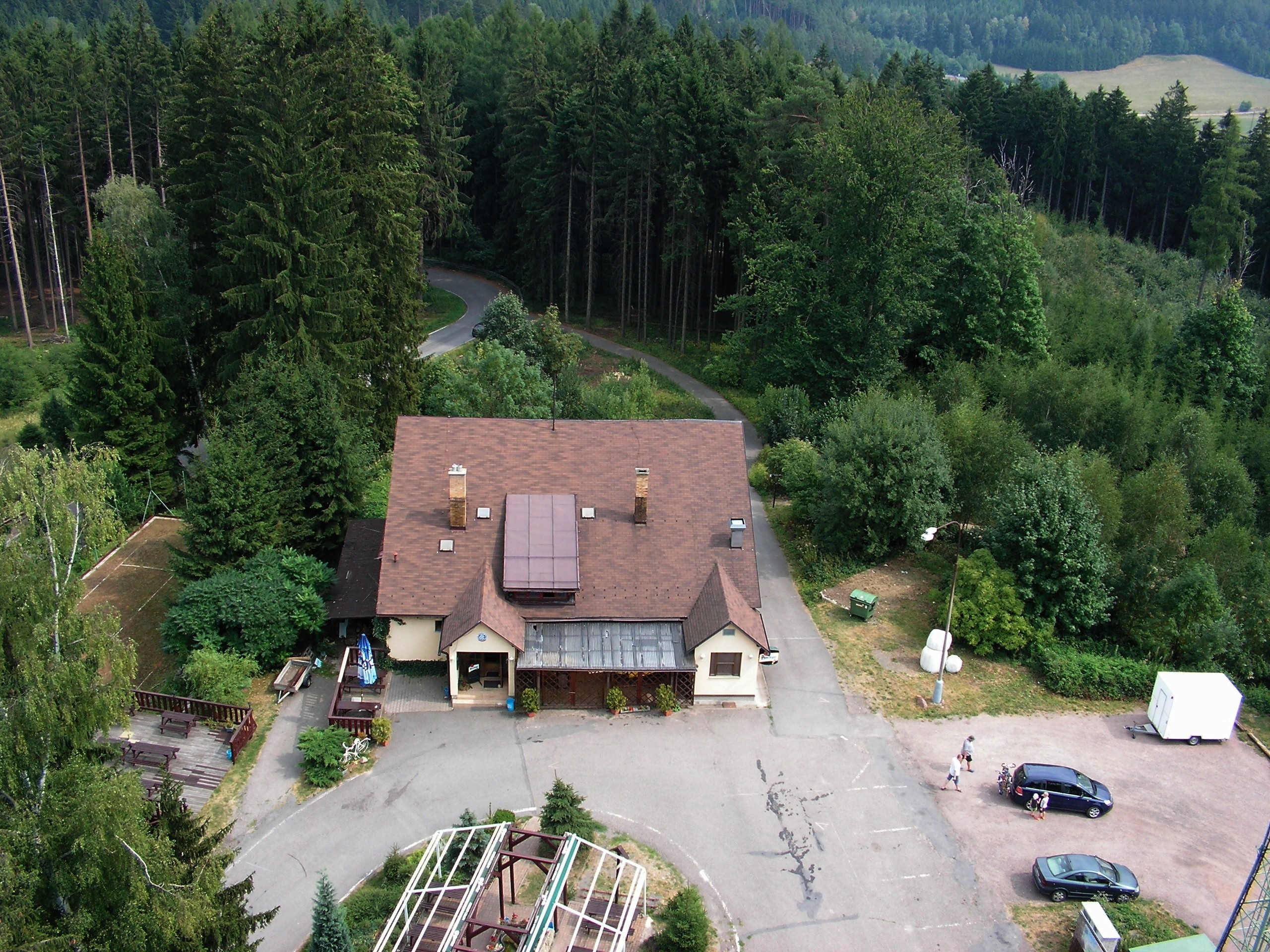 Výhled ze Stříbrné krasavice